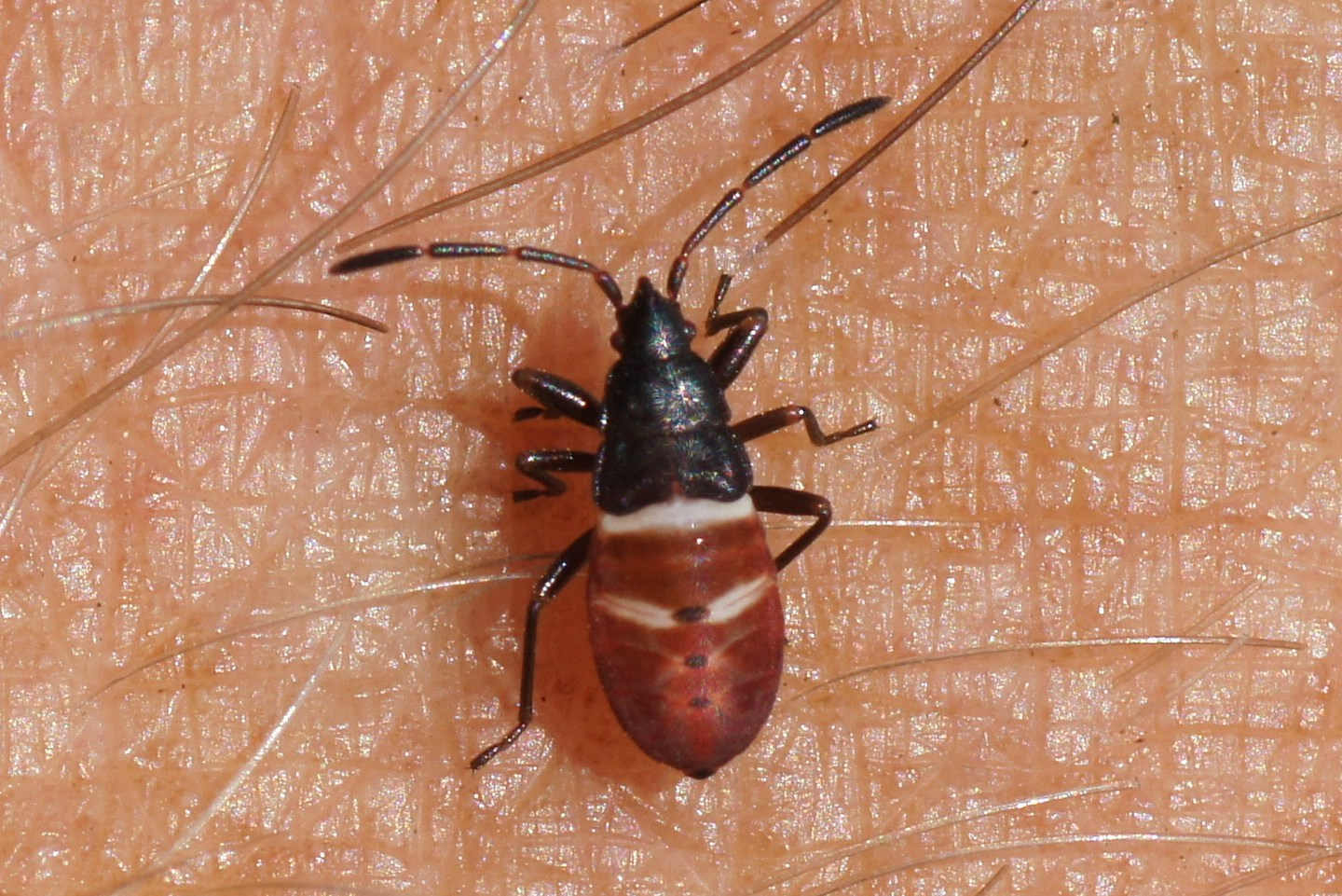 Gastrodes grossipes, nimf